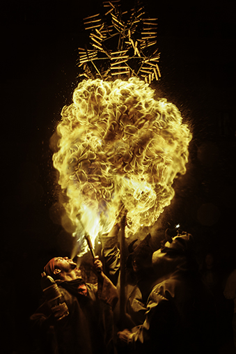 Ceptrot de Llucifer encés per piskuners a la diada del 2014